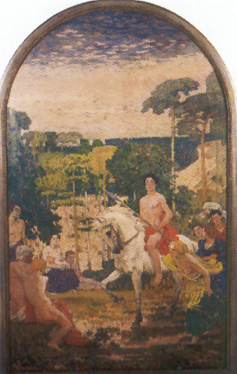 Alegorie (1910-1912), olej, plátno, 138 x 85 cm, Galerie hlavního města Prahy-Návrh na výzdobu Obecního domu v Praze. Dílo Jana Preislera, českého malíře a ilustrátora (1872 - 1918).